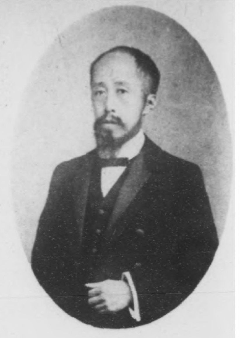 光緒甲辰科進士小像